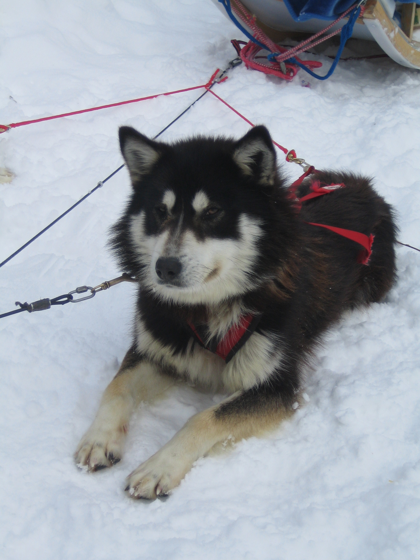 Chien (canis lupus familiaris) de race husky de Sibérie, attelé à un traineau, Mont-Tremblant.